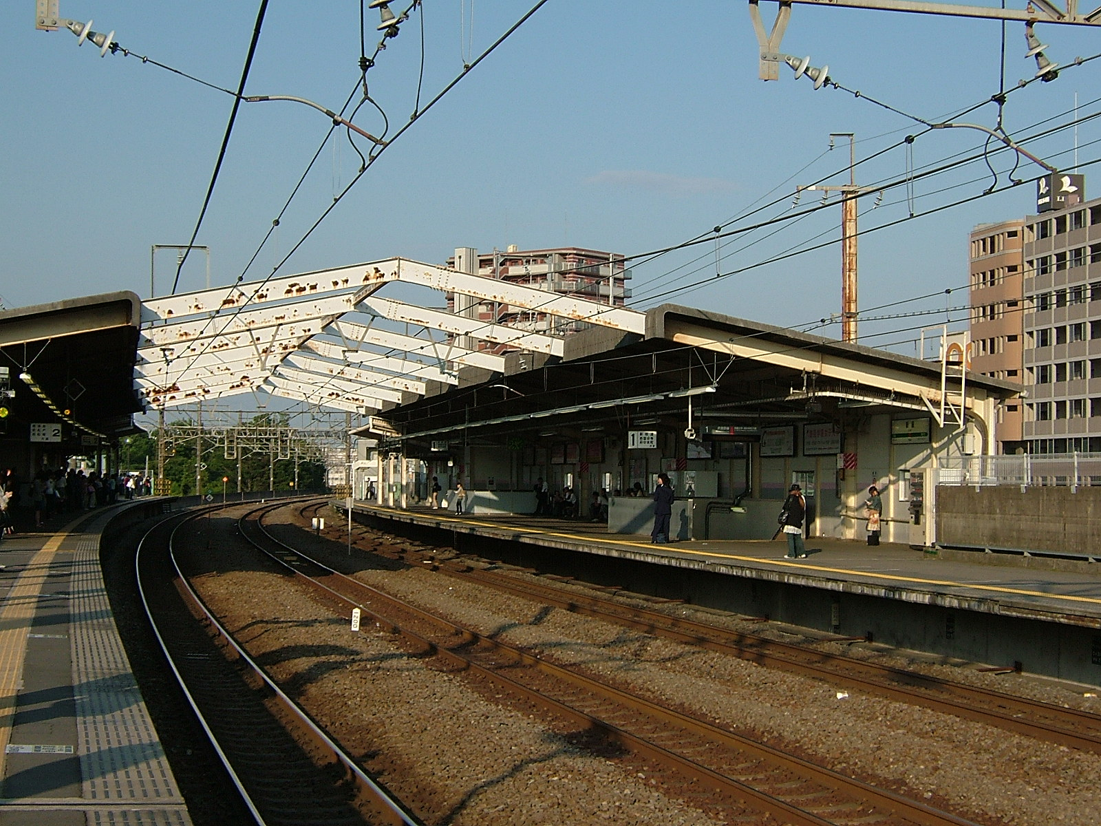 西船橋方面ホームからみた武蔵野線新座駅構内